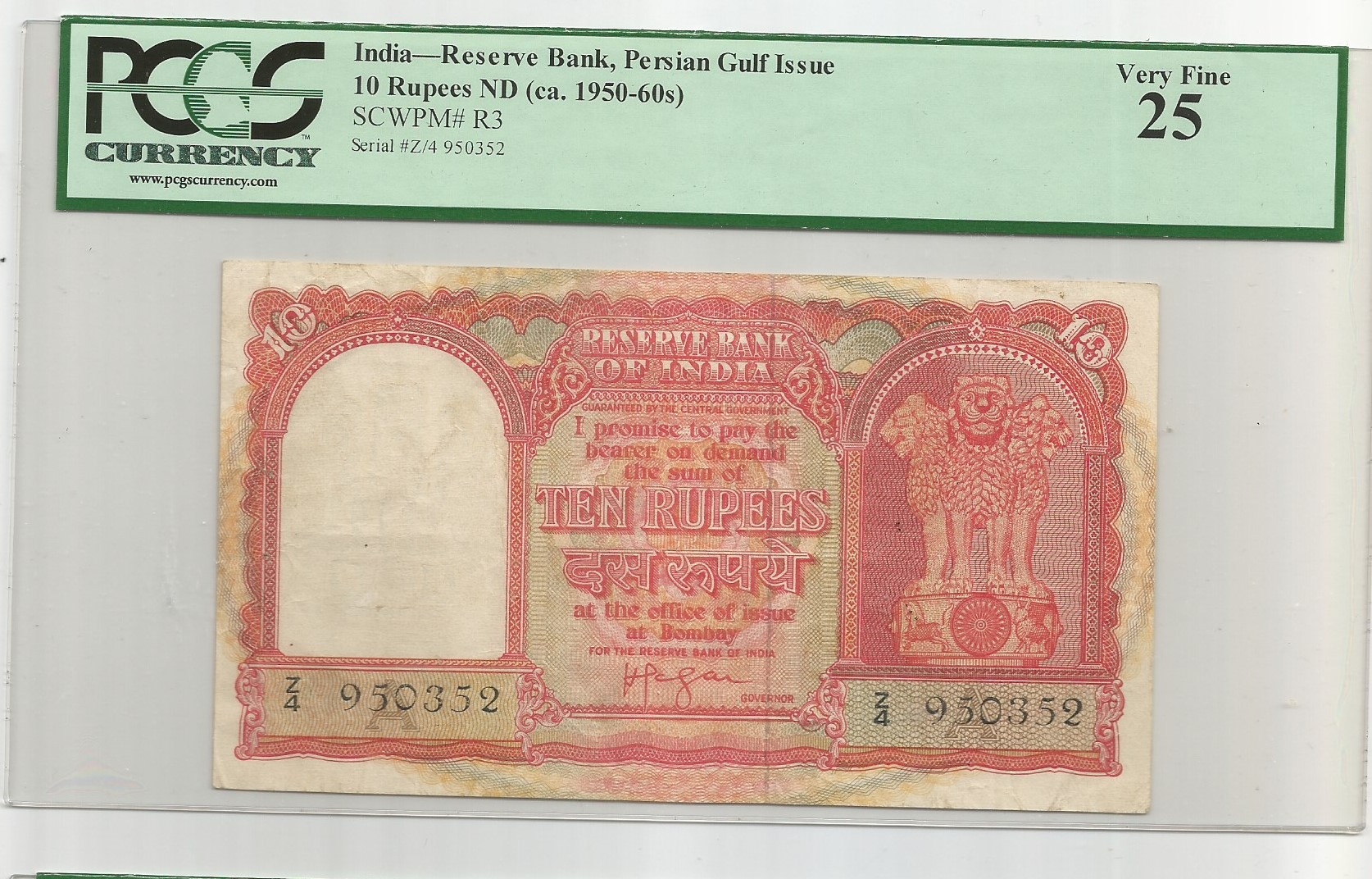 שטר עשר רופיות של המפרץ הפרסי